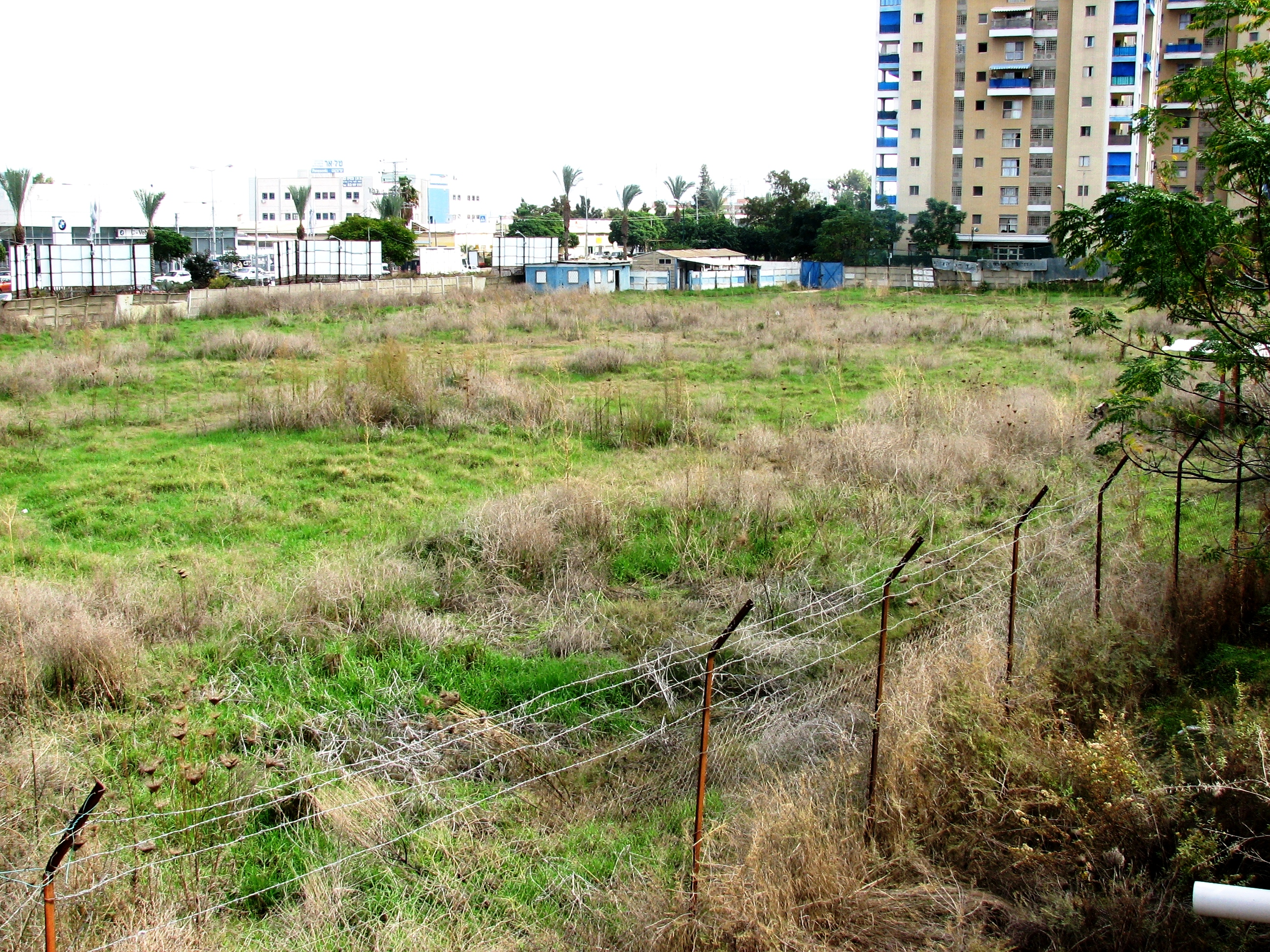 Tel Hanan neighborhood in the city Nesher שכונת תל חנן בעיר נשר, הוקמה בשנת 1948, בשנת 1952 אוחדה יחד עם נשר ובן דור למועצה מקומית מגרש הכדורגל הישן של הפועל תל חנן. אינו בשימוש